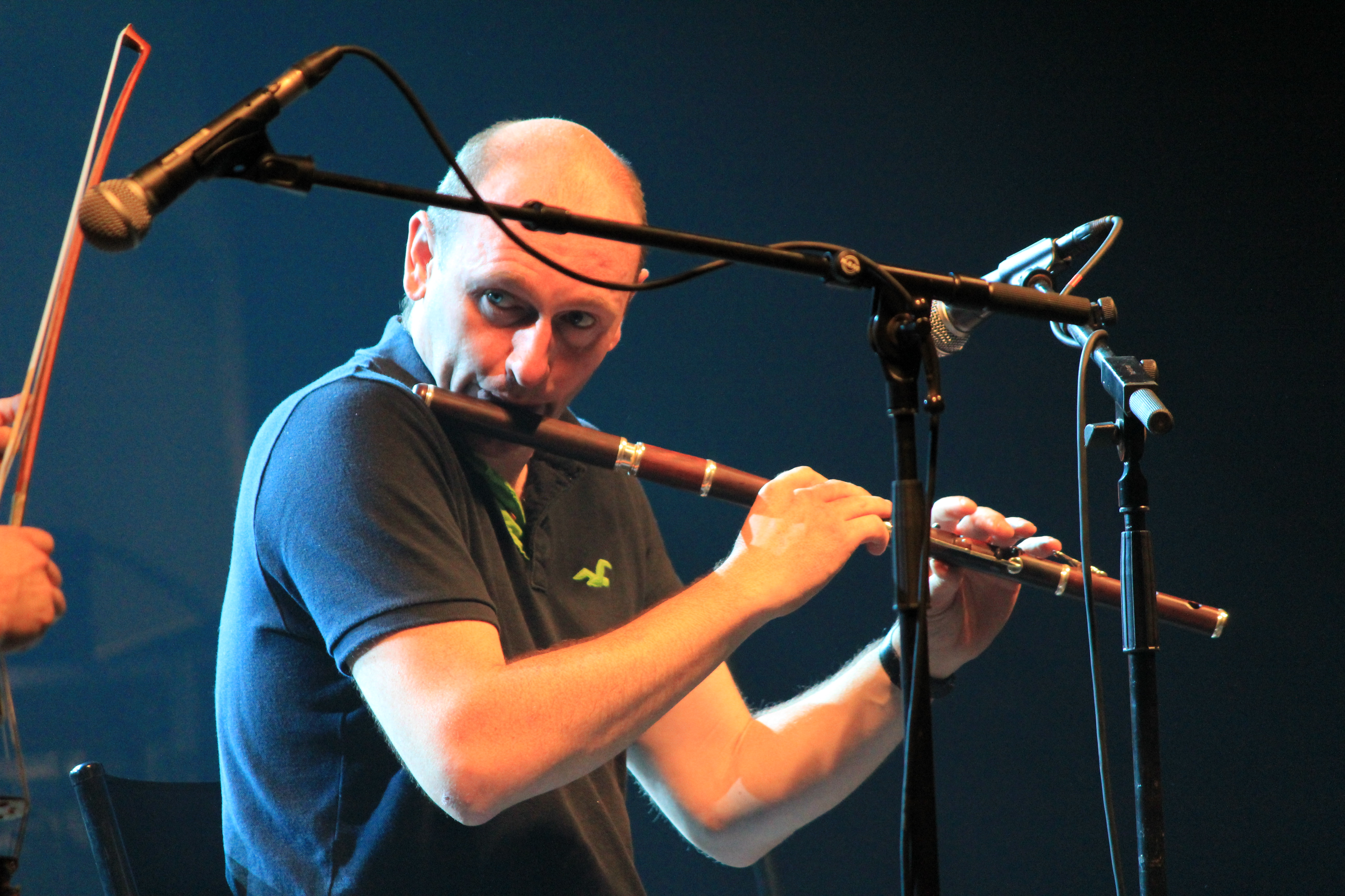 Michael McGoldrick lors d'un concert au Festival interceltique de Lorient réunissant Michael Mc Goldrick, John Mc Cusker, et John Doyle